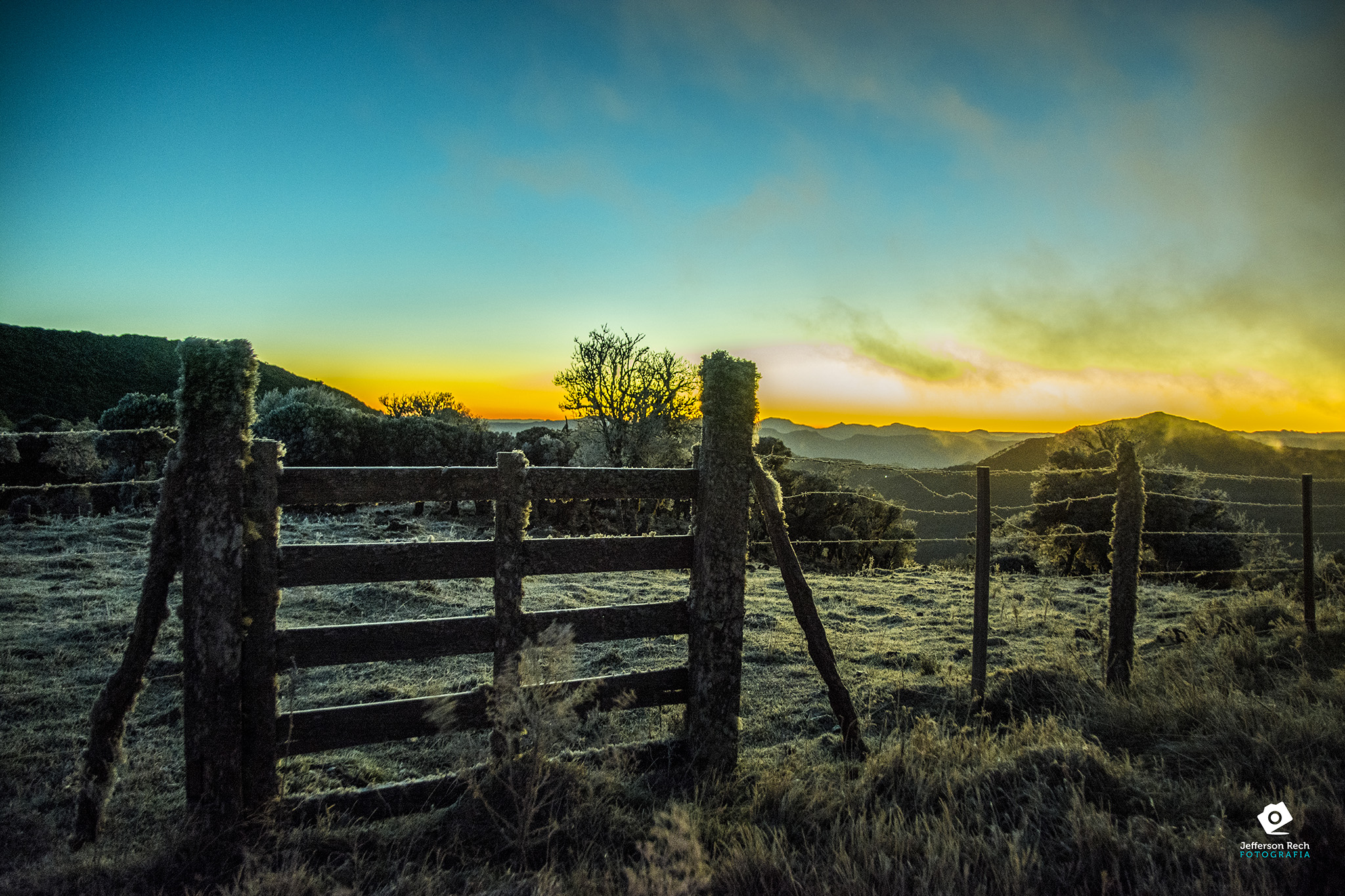 Amanhecer no Morro das Antenas em Urupema. No dia estava -7ºC com sensação térmica de -26ºC Urupema é considera a cidade mais fria do BRASIL.